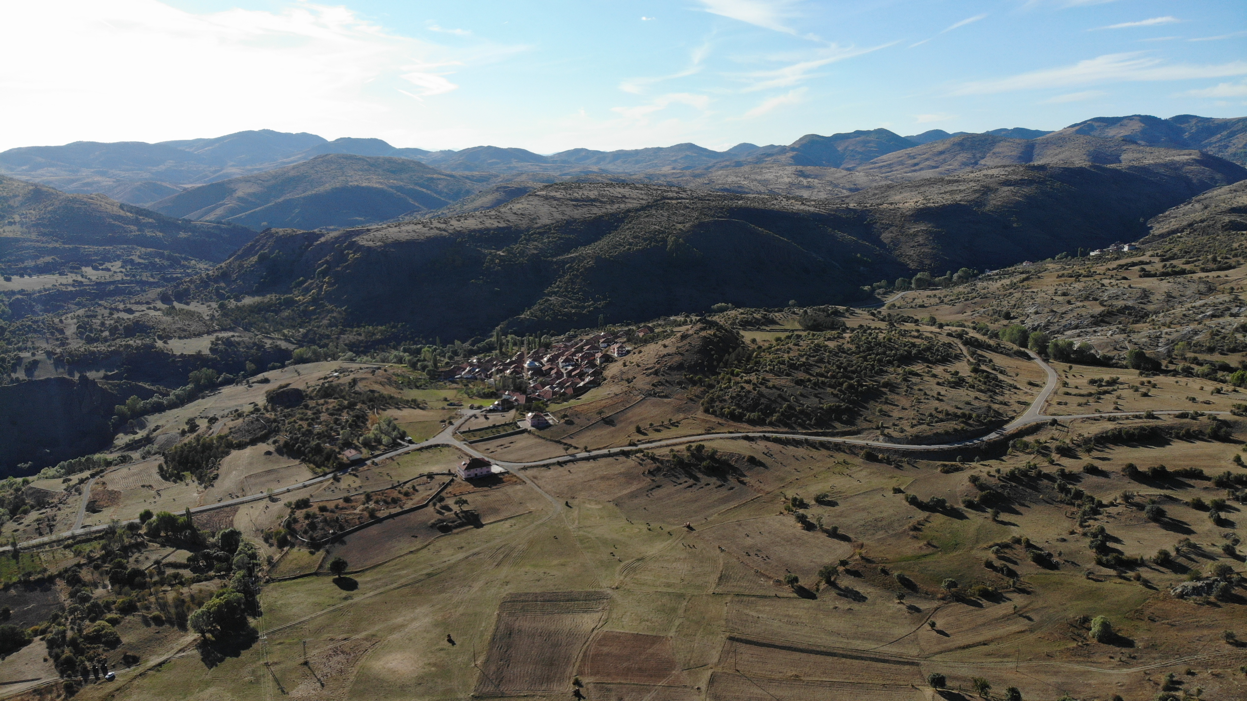 harman bölgesinden köye doğru bakış havadan çekim